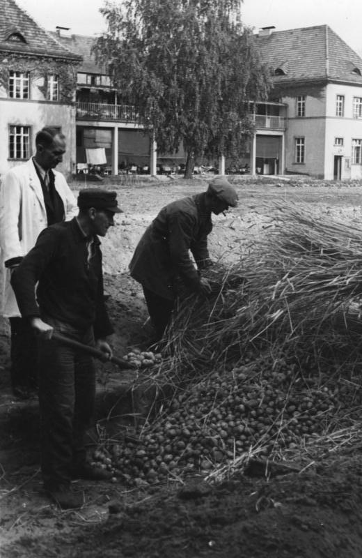 Berlin-Buch, Kartoffelernte Illus-Heinscher 10.10.47 Kartoffelernte im Hufeland-Hospital [Berlin]- Buch 903-47